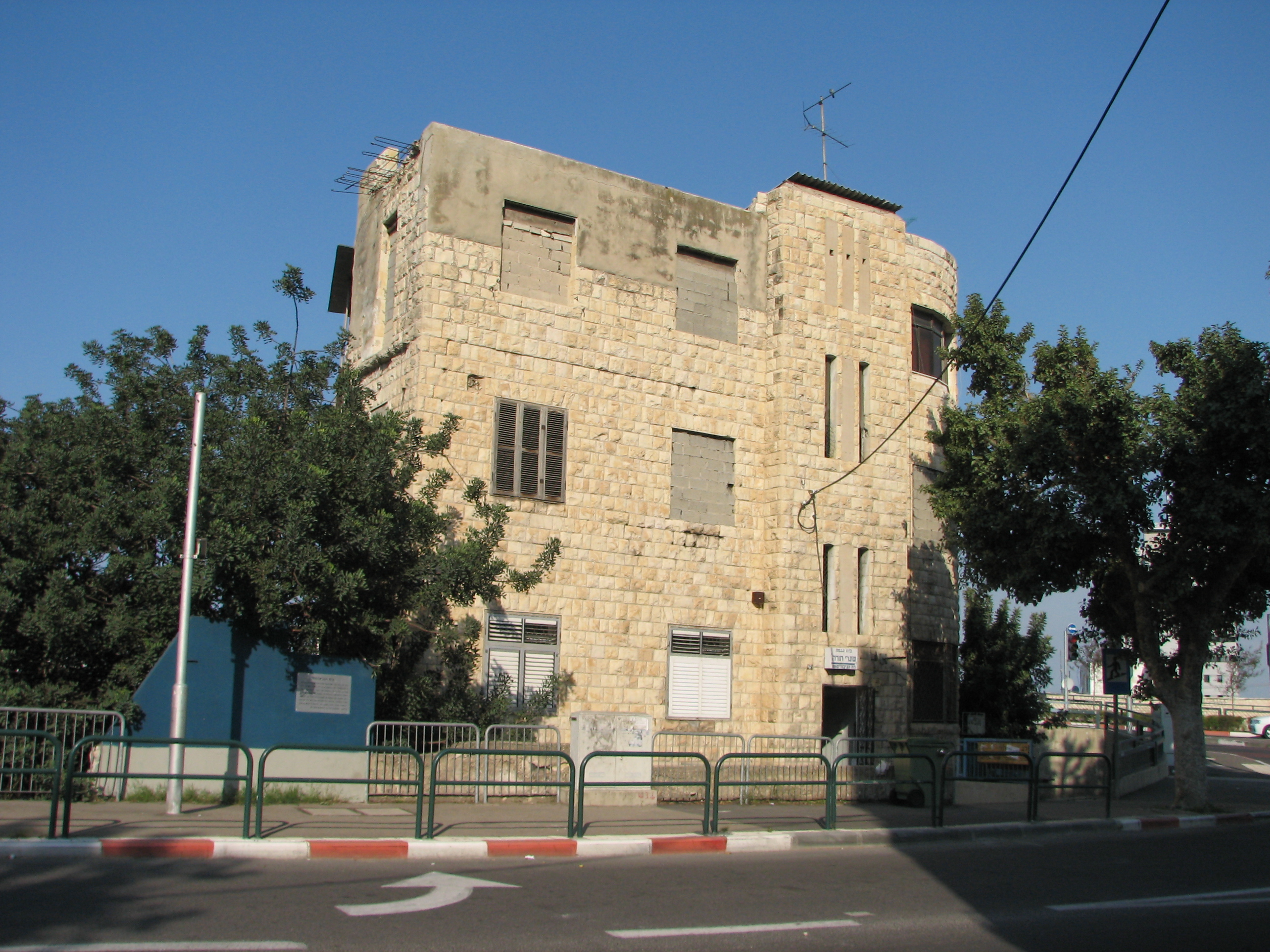 Rushmia bridge, Haifa, Israel גשר רושמיה בחיפה, מעל ואדי רושמיה. שכונת חליסה. בקרב על חיפה במלחמת העצמאות התחוללו קרבות כבדים על בית הנג'אדה בקרבתו. לאחר המלחמה הוחלף שמו לגשר הגיבורים ושם הואדי תחתיו - לנחל הגיבורים. בסמוך לגשר - אנדרטה ללוחמי גדוד 22 שנפלו במלחמת העצמאות בית הנג'אדה בחיפה, ליד בית זה נוהל קרב כבד במלחמת העצמאות, על המעבר על גשר רושמיה כתובת: רחוב הגיבורים 29